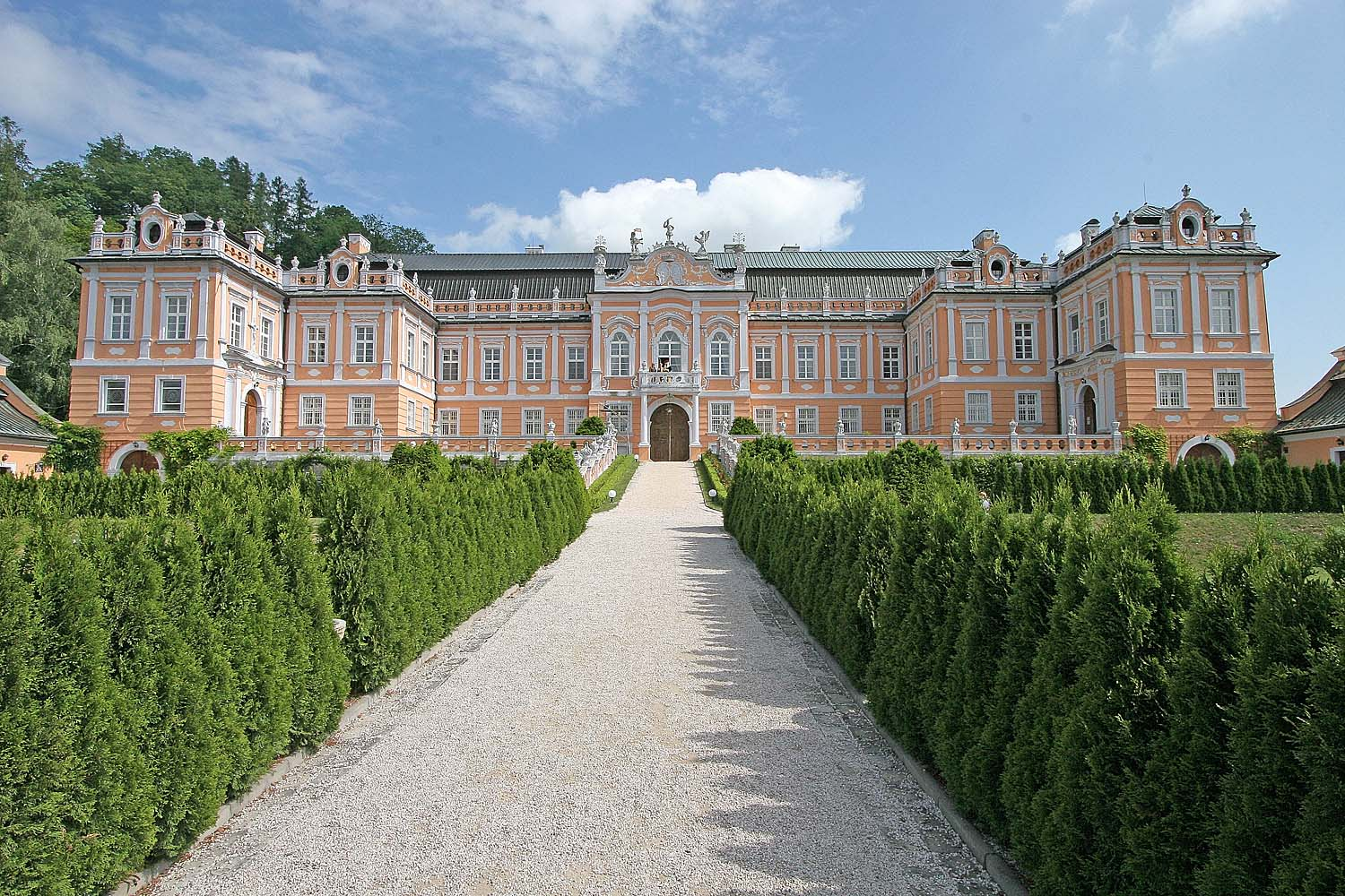 zámek Nové Hrady v okrese Ústí nad Orlicí (dříve Chrudim)